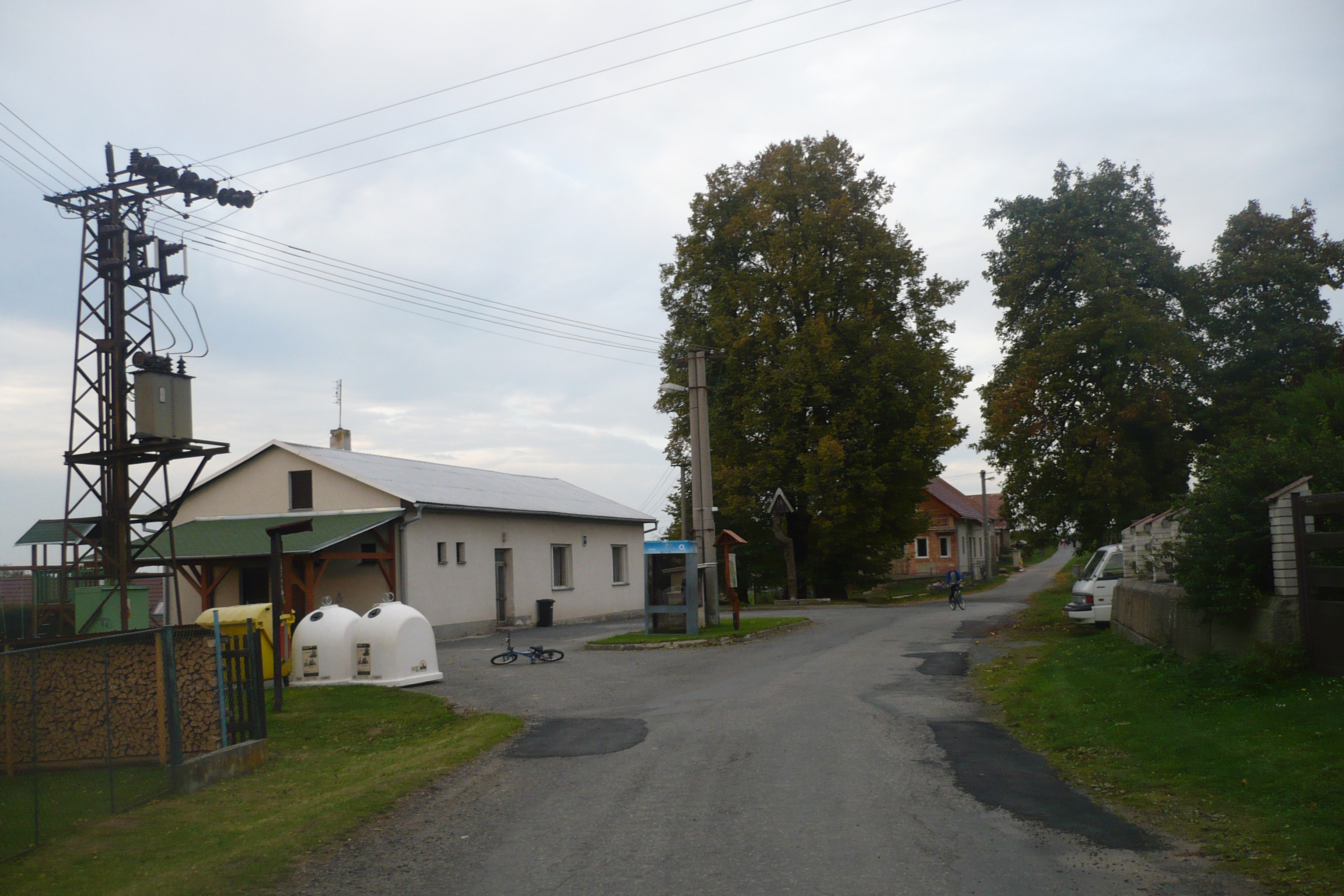 centrum obce Prosíčka